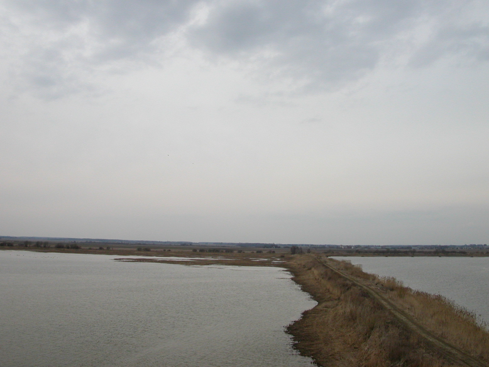 Tvenkiniai Gabšiuose